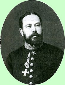 В. Л. Приклонский (1852—1898)– тайный советник, исследователь Якутии, библиограф, вице-губернатор (1890-х гг).